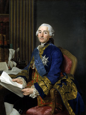 Portrait of César Gabriel, Comte de Choiseul, Duc de Praslin, Foreign Minister in France